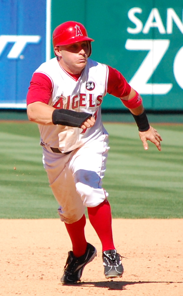 Reggie Willits